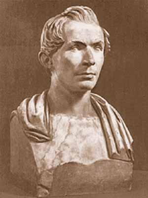 Самуил-Фридрих Иванович Га́льберг (1787—1839) — русский скульптор, представитель классицизма.